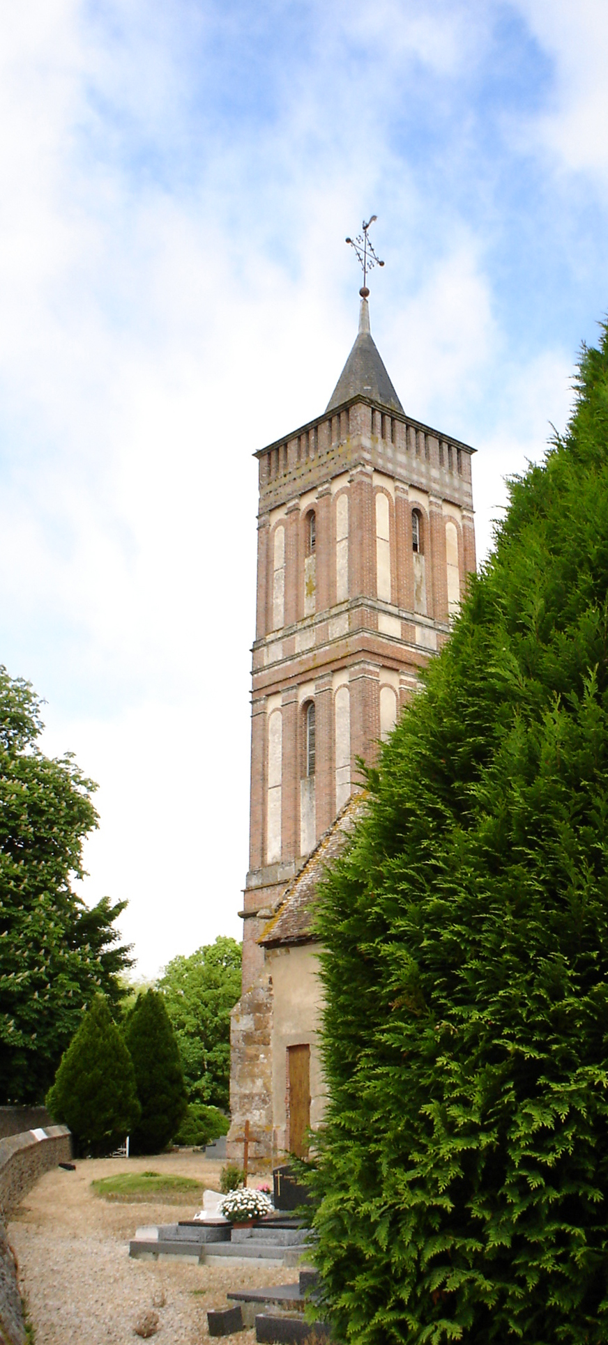 Église de Beaulieu